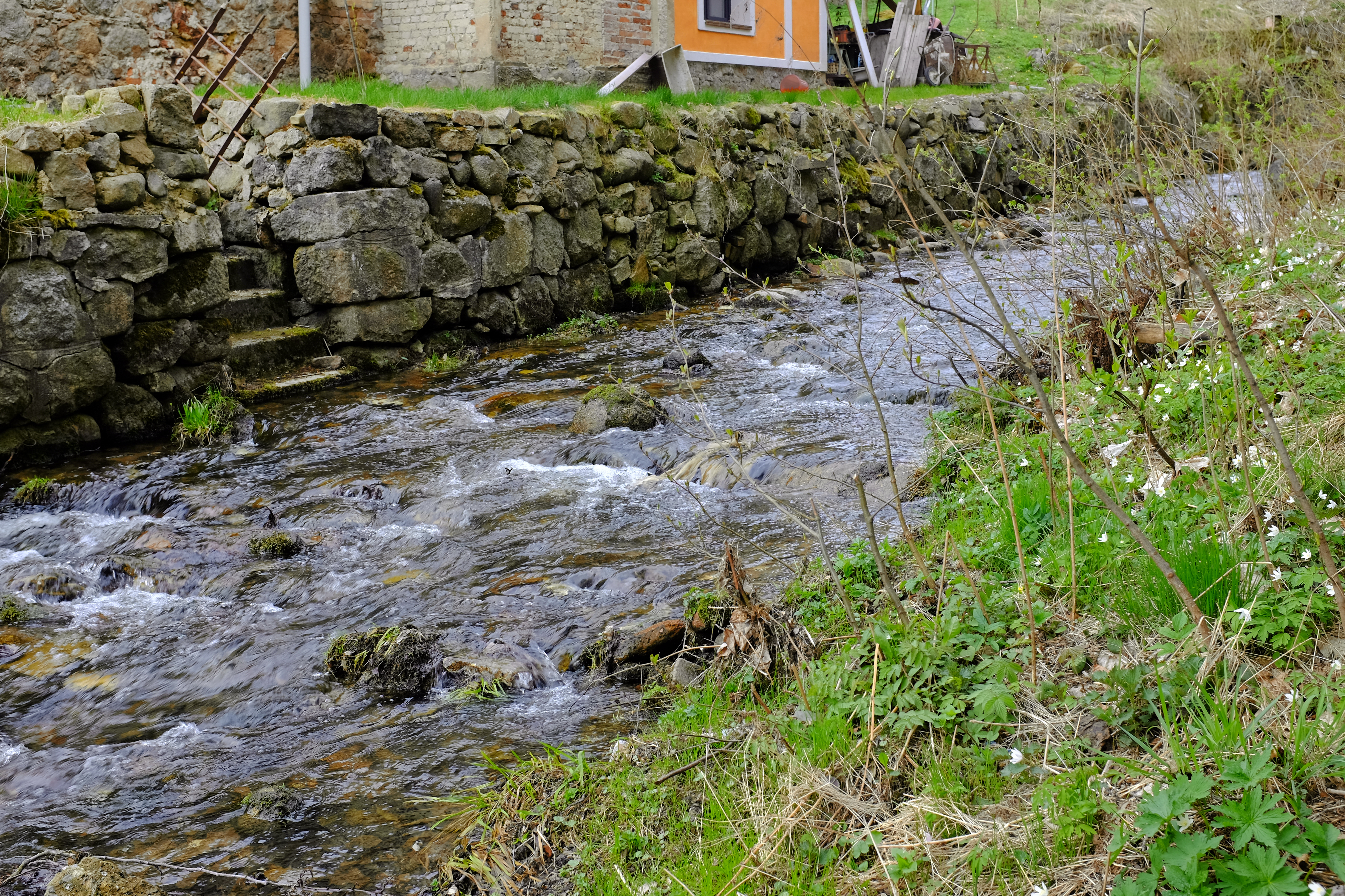 Eliášův potok nad soutokem s potokem Bystřice, Krušné hory, okres Karlovy Vary